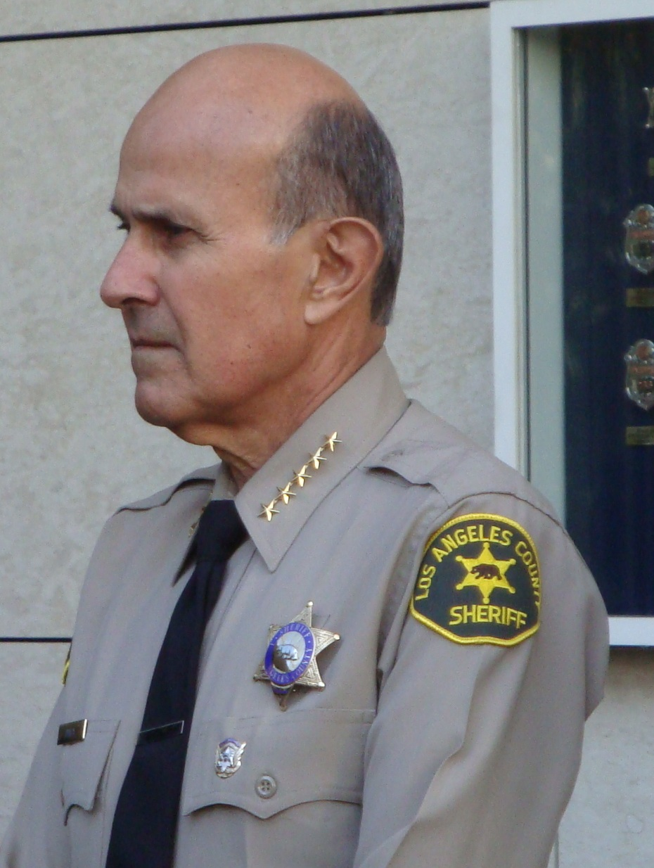 Lee Baca